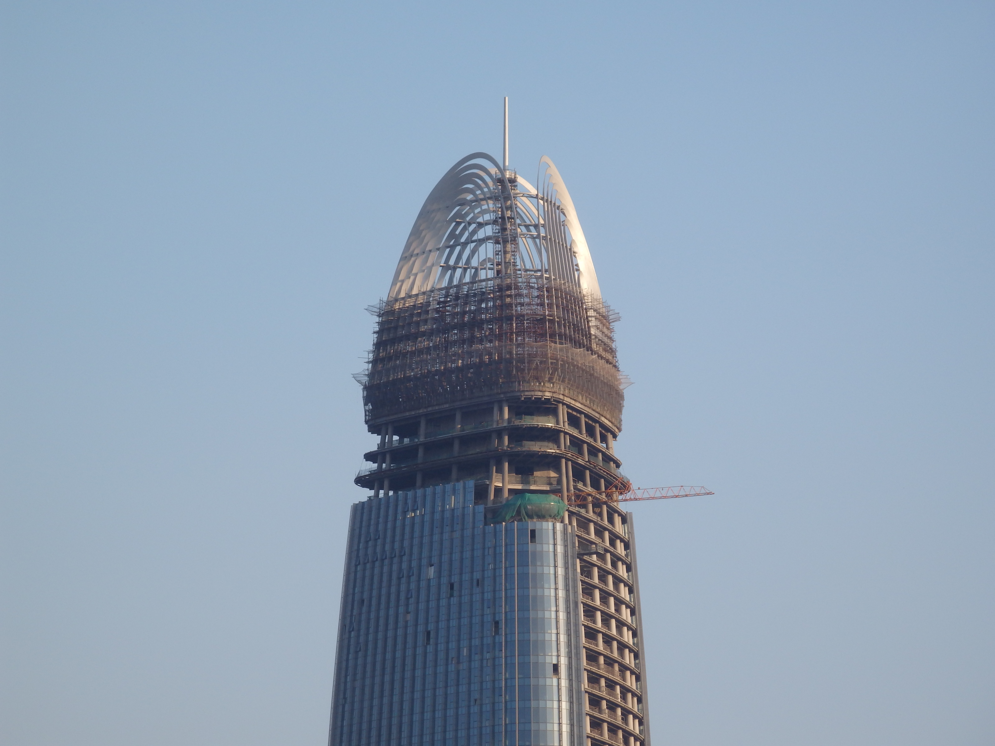 济南绿地中心建设过程，2014年5月摄。